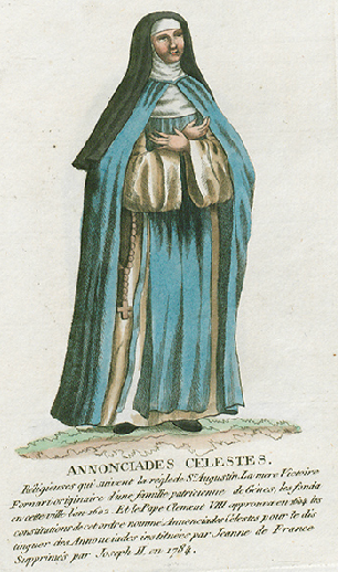 Collection de costumes de tous les ordres monastiques, supprimés à differentes époques, dans la ci-devant Belgique, Bruxelles, Philippe Joseph Maillart et sœur, 1811